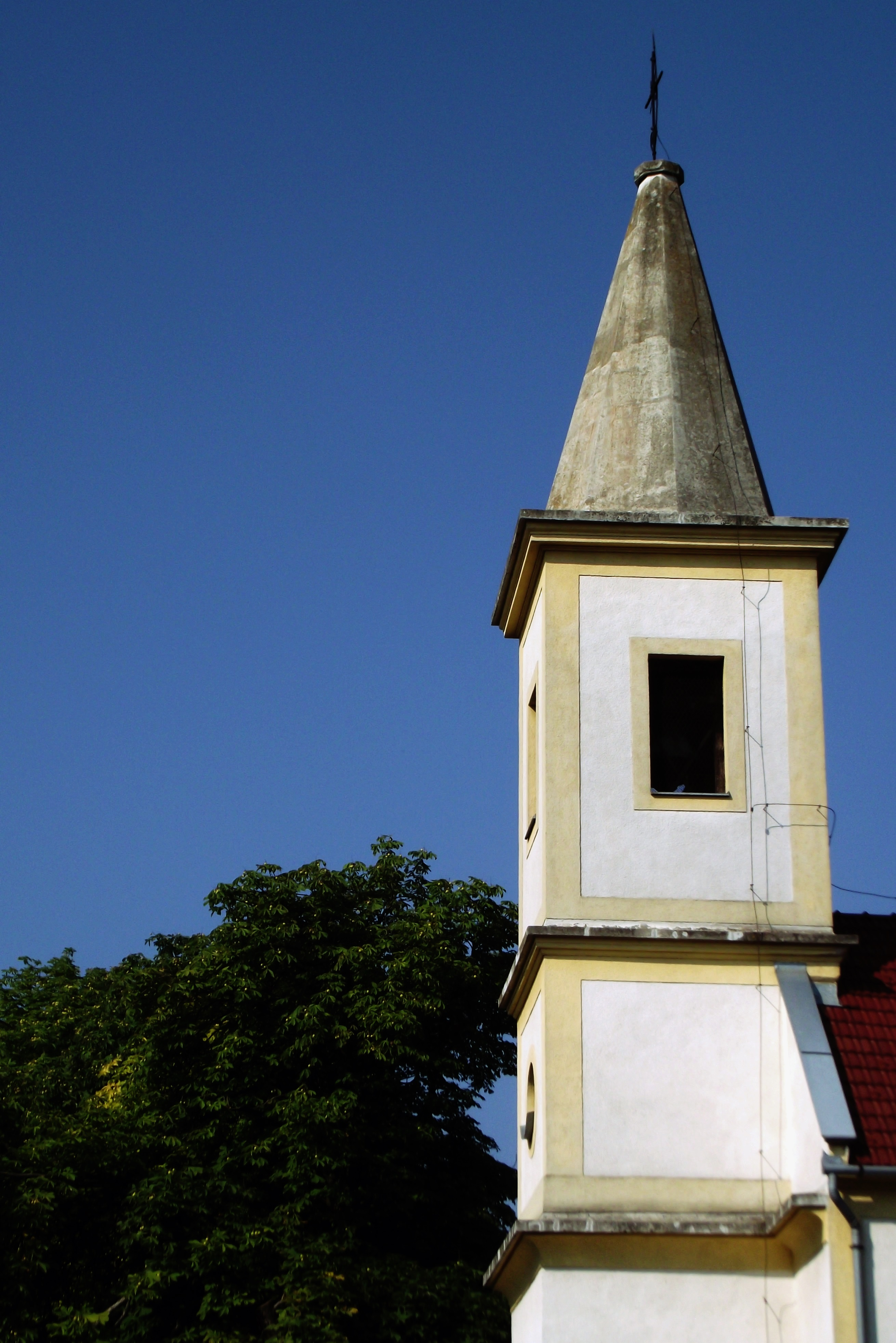 A mórichidai evangélikus templom tornya, amely később épült a templom fő részéhez.